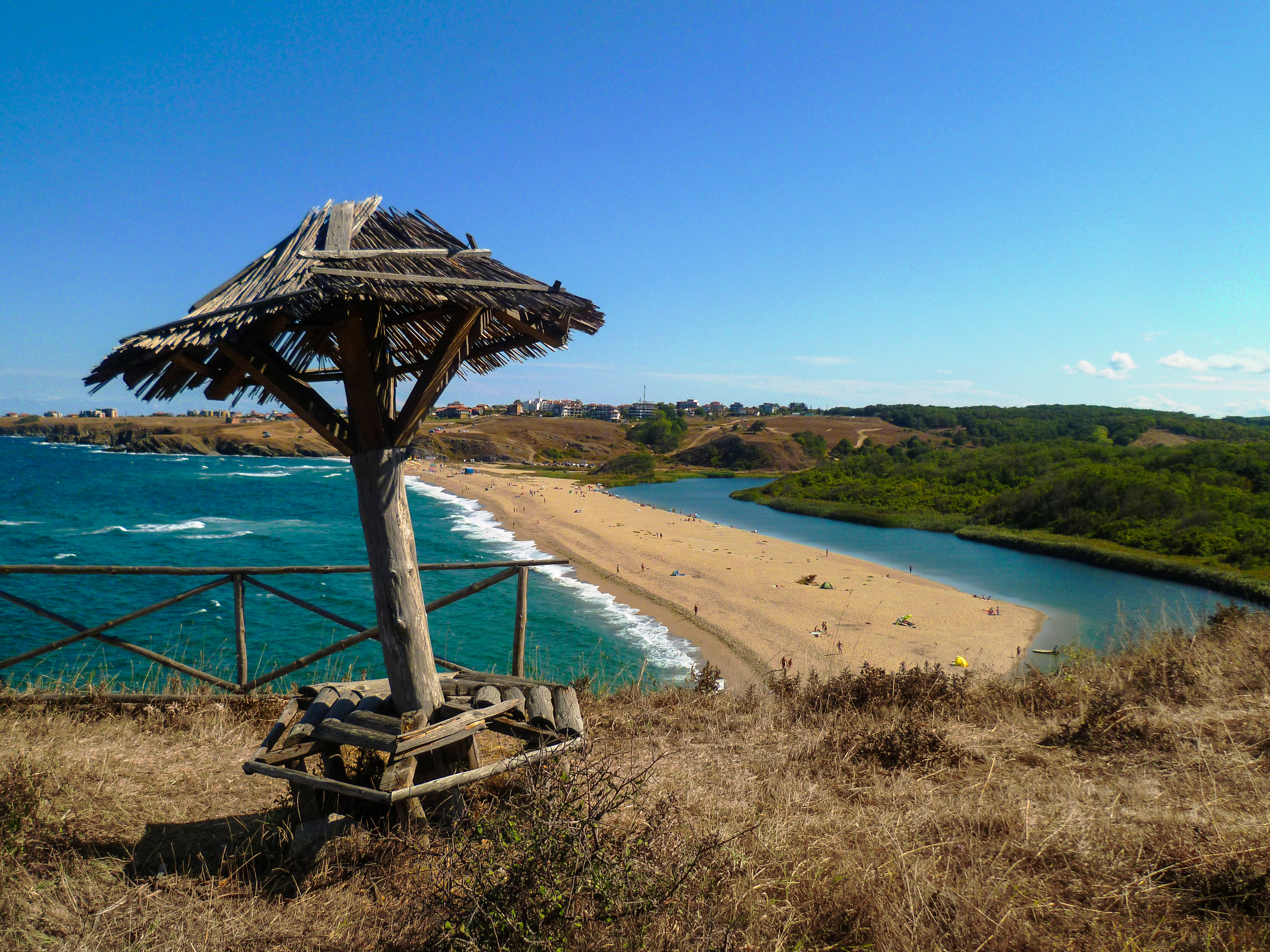 Отдясно е лагуната на река Велека, а отляво Северния плаж на Синеморец. Местността е обявена за резерват.